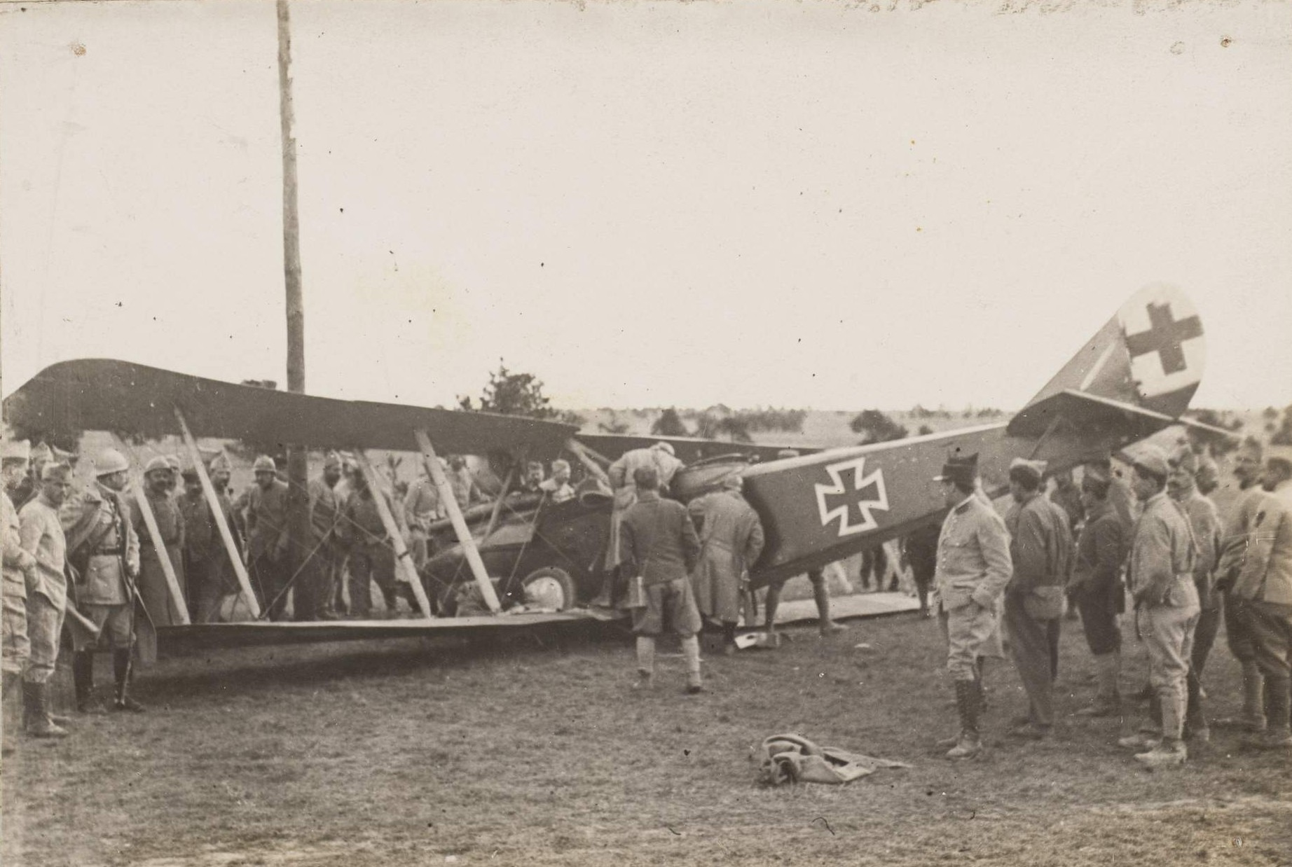 Front de Champagne. Le 12ème avion allemand abattu par l'adjudant Garaud.